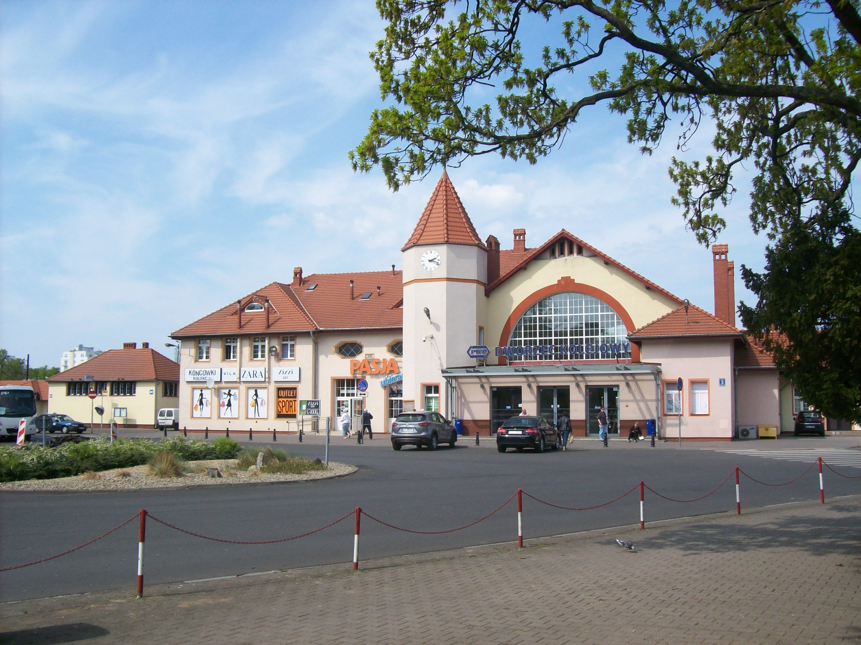 Widok na budynek stacji kolejowej Kołobrzeg